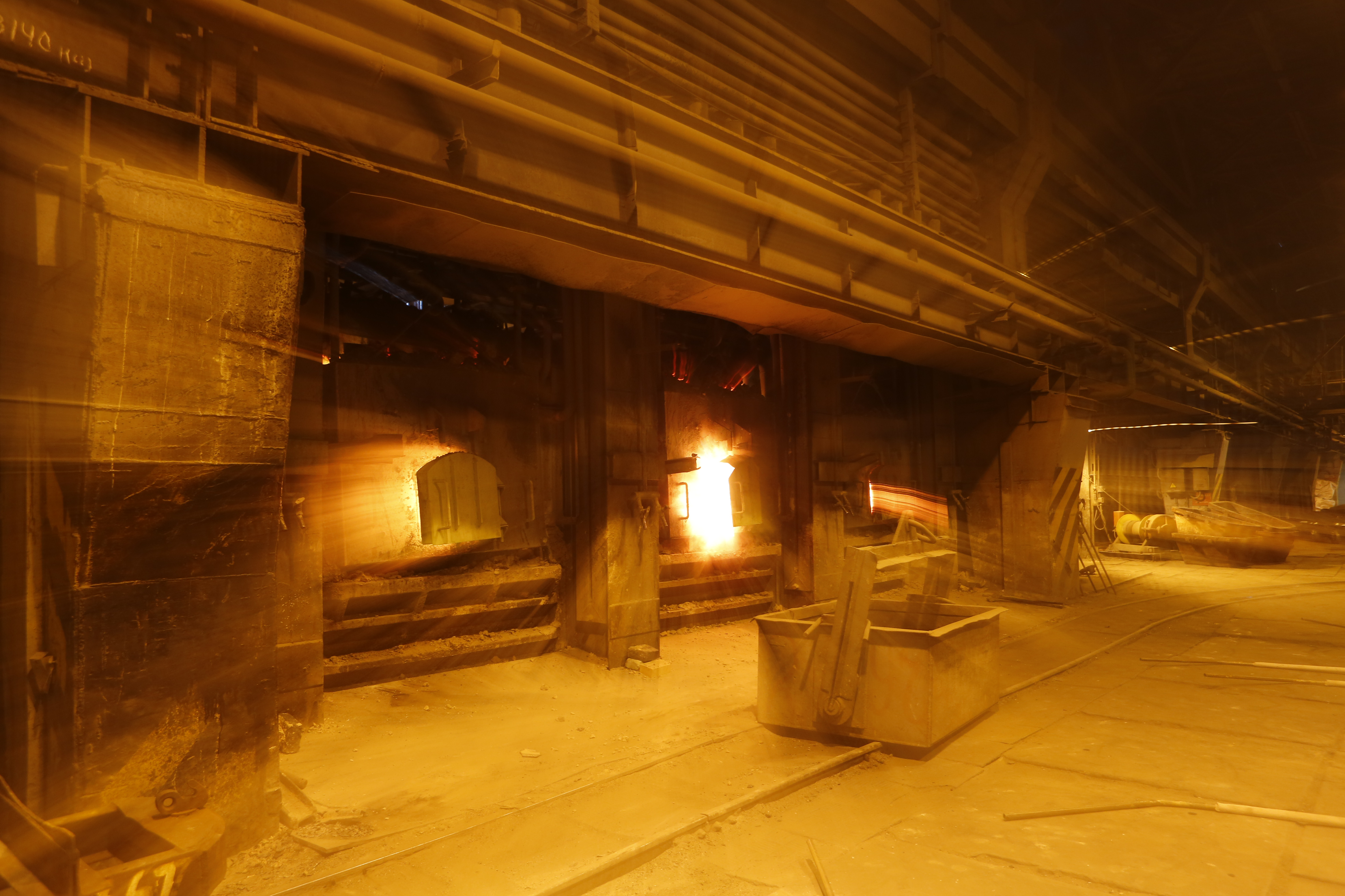 Вики-экспедиция "Медная столица России", день первый. Медеплавильная печь.